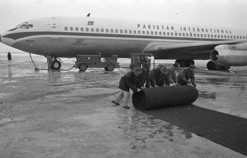 Pakistanischer Staatspräsident Ayoub Khan zu Besuch in Deutschland Verabschiedung durch den bayerischen Ministerpräsidenten Ehard auf dem Flugplatz München-Riem